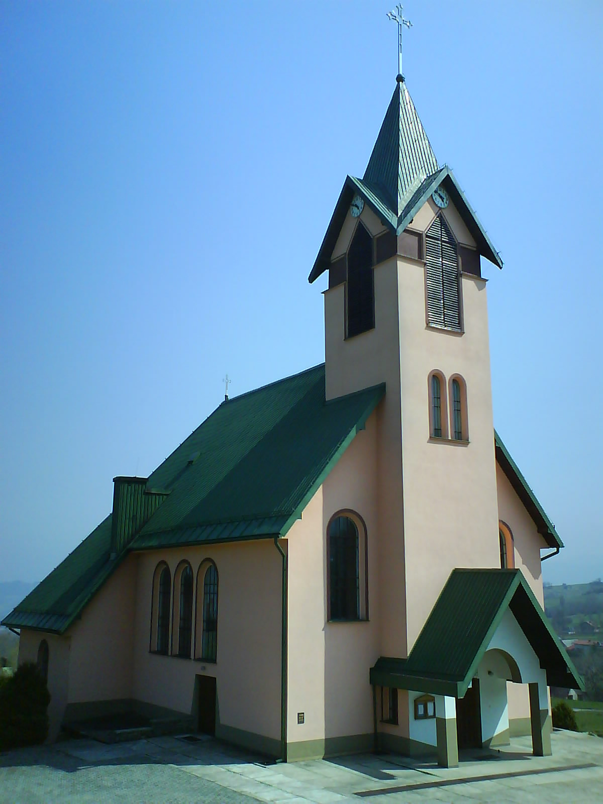 Kościół parafialny w Ostrem, wybudowana i poświęcona w 1988 roku, należy do parafii radziechowskiej